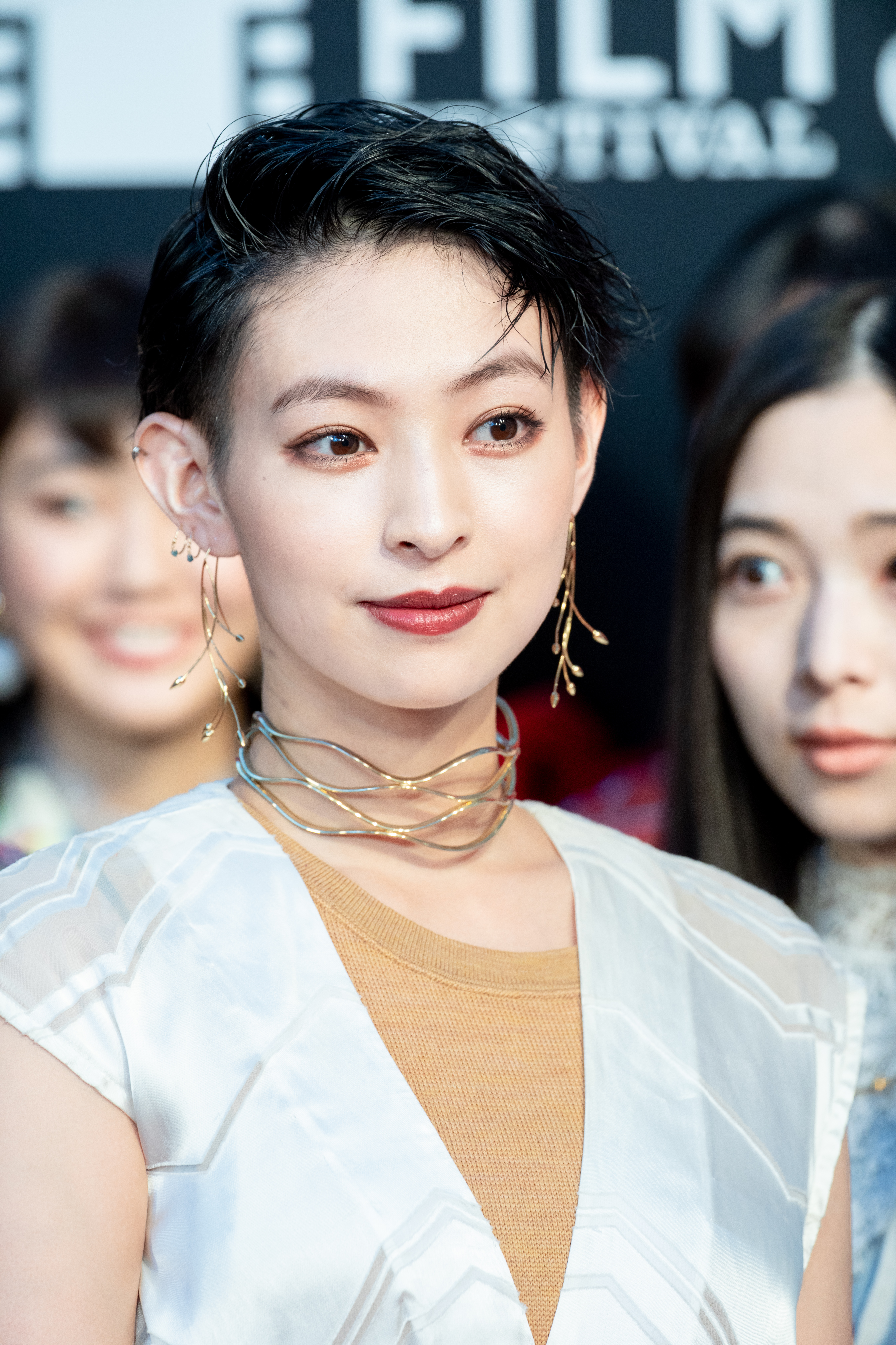 第30回 東京国際映画祭 オープニングセレモニー 日南響子（『21世紀の女の子』）